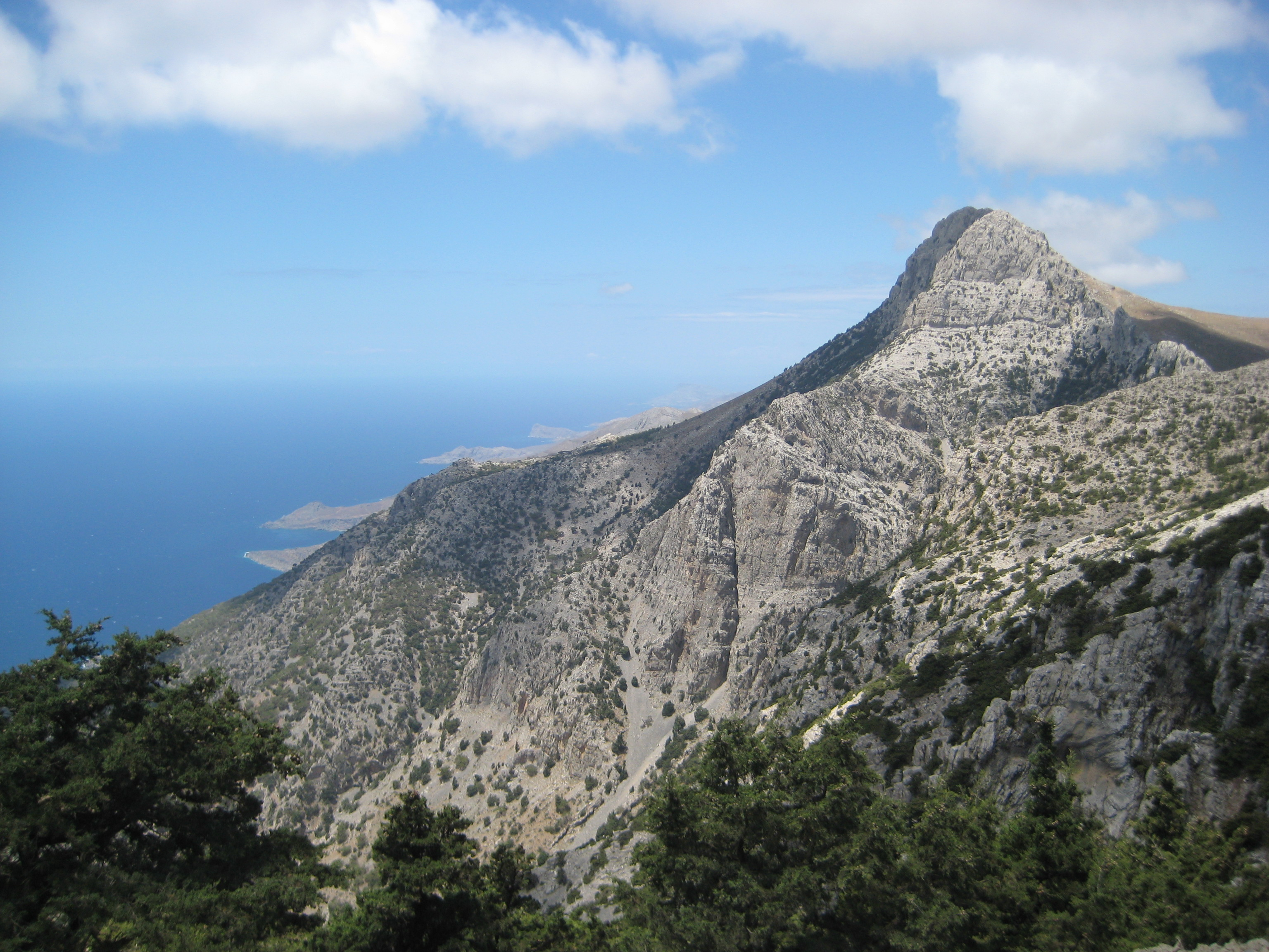 Ανατολική άποψη This is a photography of Natura 2000 protected area with ID GR4310005